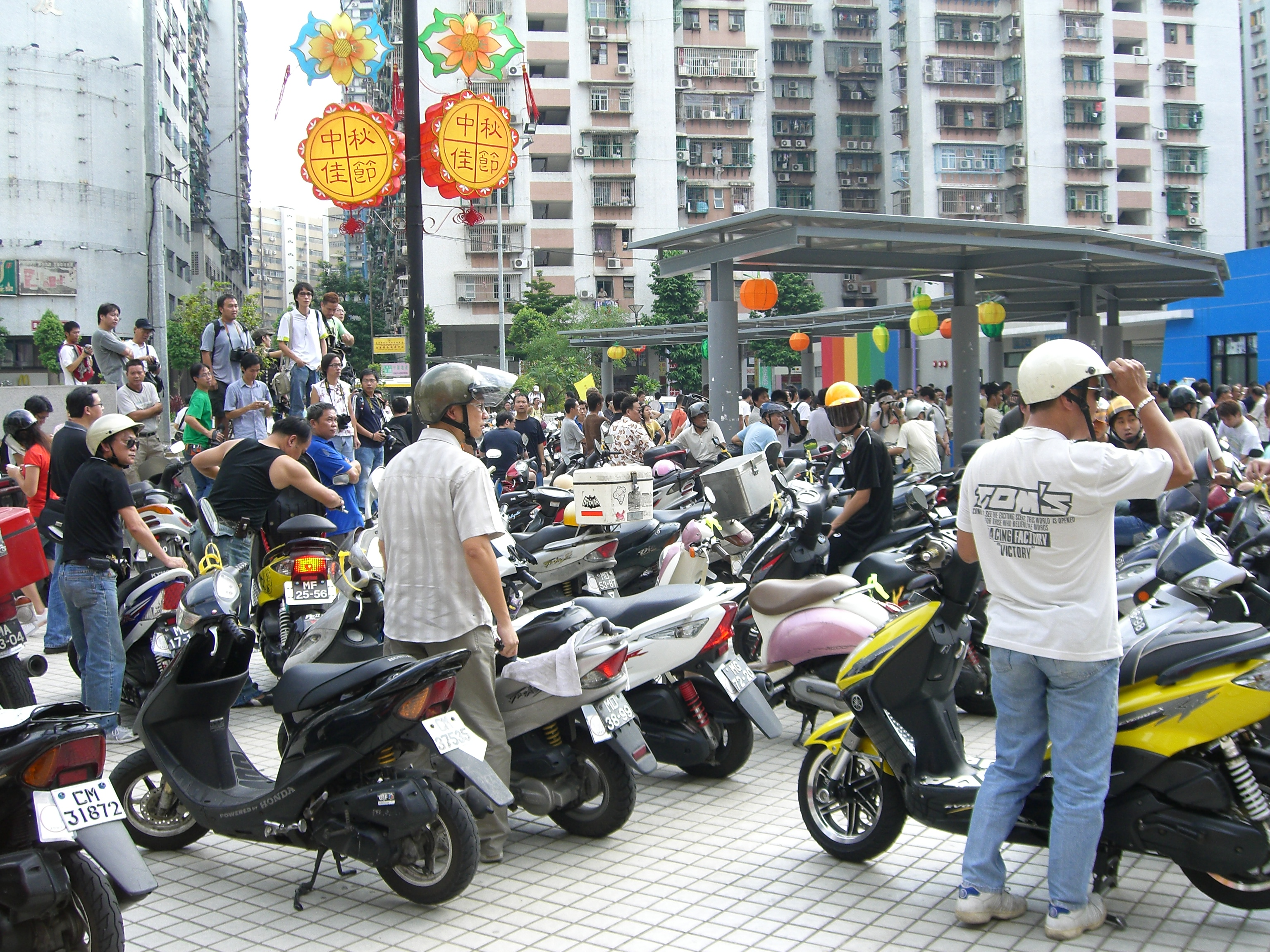 Macau 9.30 Parade